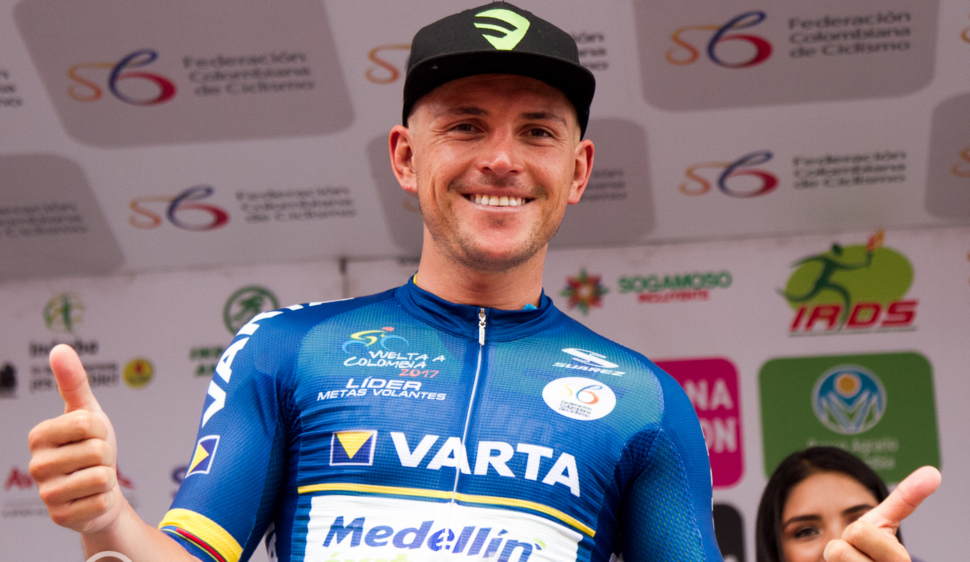 Weimar Roldán en el podio. Eta.11 Vuelta a Colombia 2017